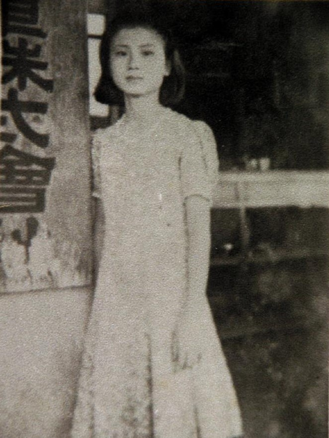 施水環之像